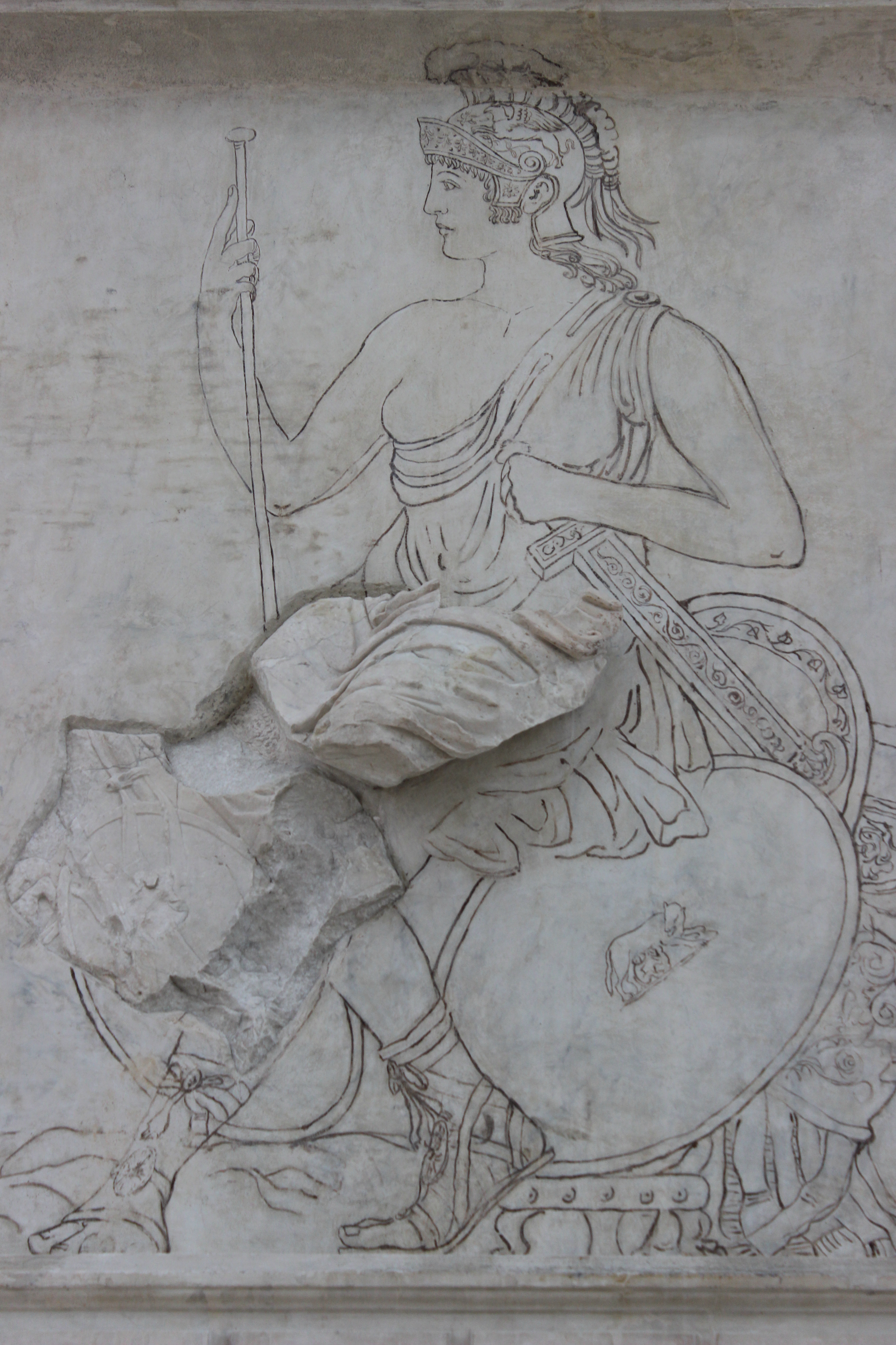 Relieves del exterior del Ara Pacis.